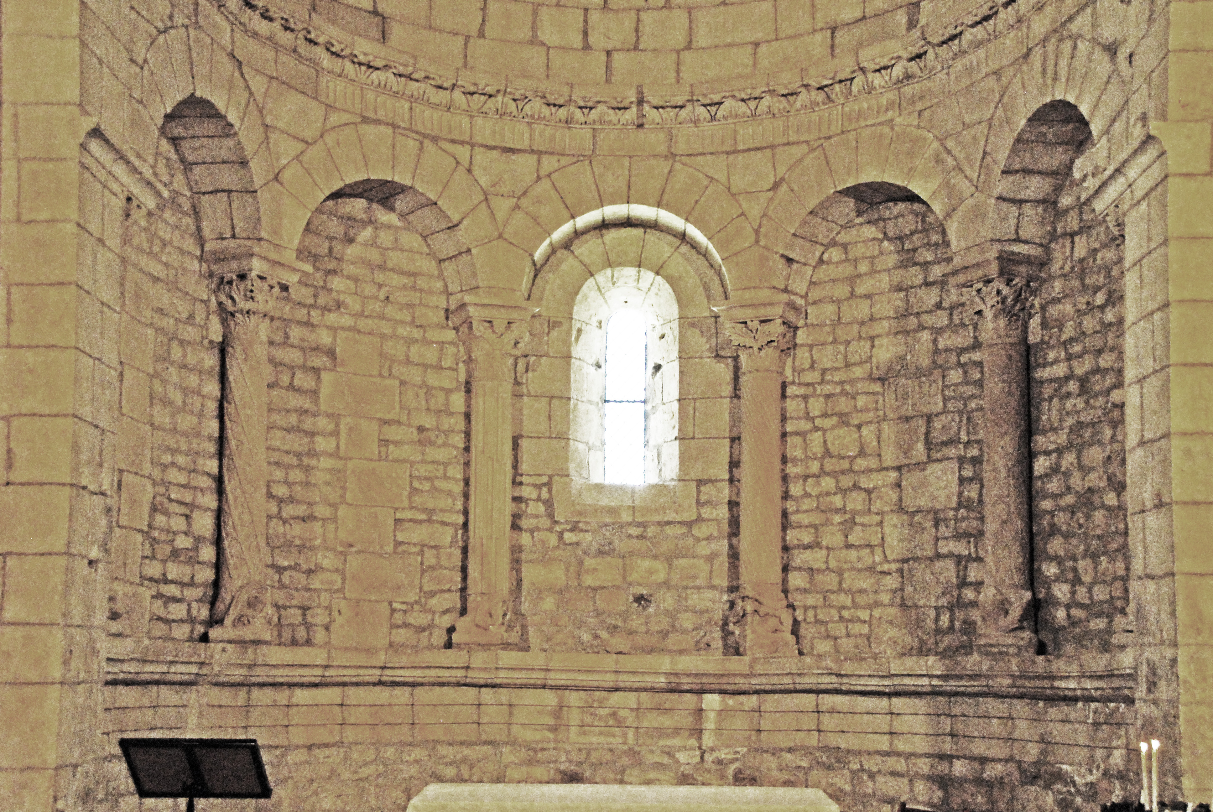 N-D et St-Christophe de St-Christol, Chorapsis, Blrendarkatur